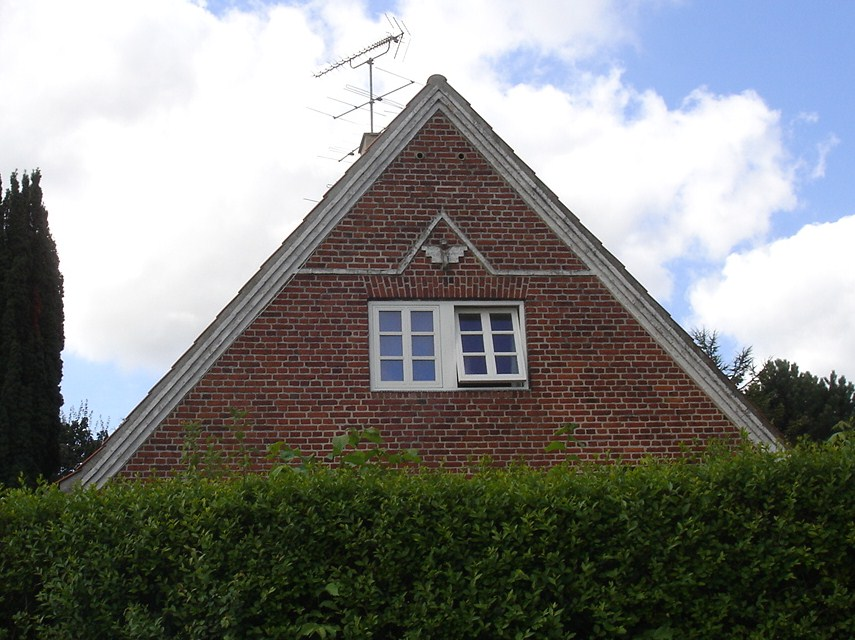 Gavlen på Vestenskov Station